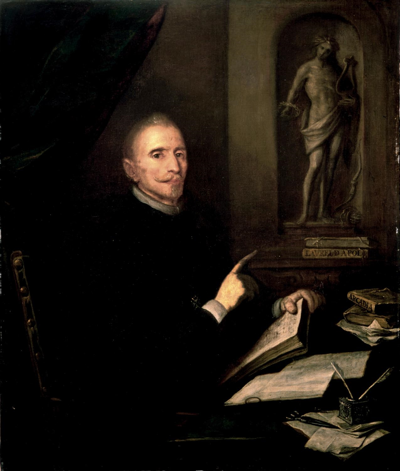 Retrato anónimo del célebre dramaturgo español Félix Lope de Vega y Carpio (1562-1635). Es una obra anónima de la escuela madrileña.